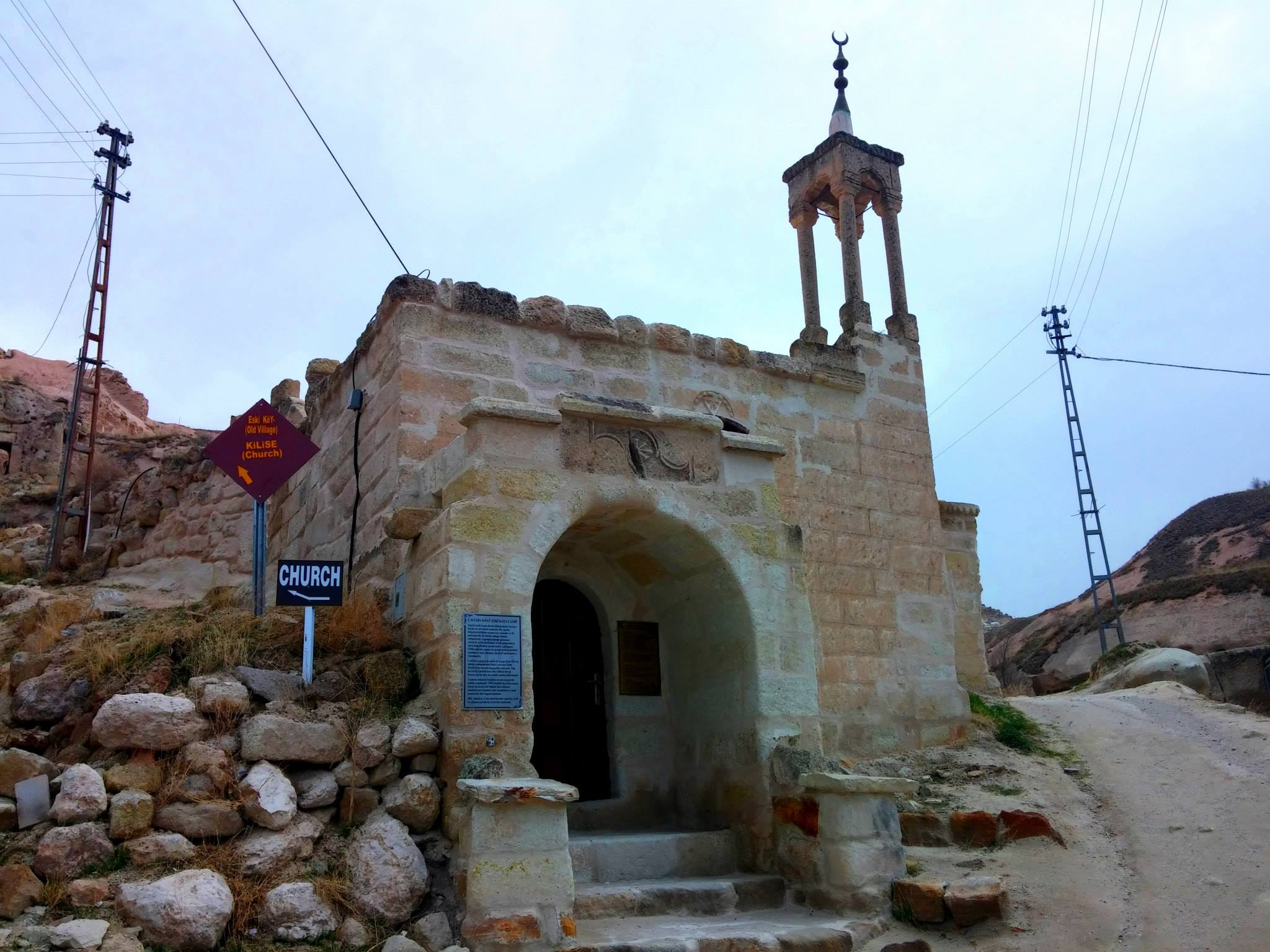 Nevşehir'in Çavuşin köyünde yer alan Çavuşin Eski Kaya Cami.